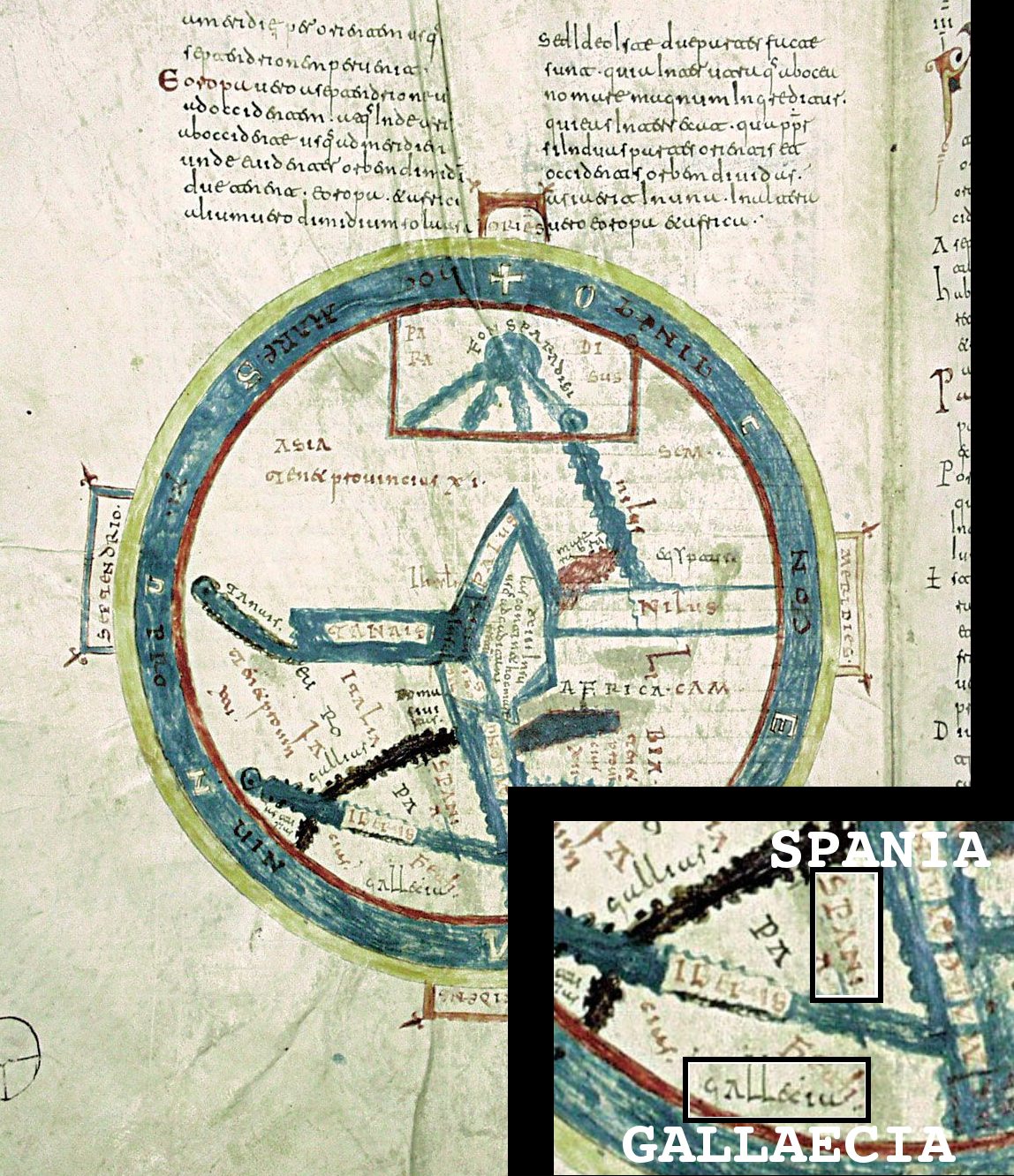 Mapa Etimoloxias Isidoro de Sevilla. Espazos penínsulares